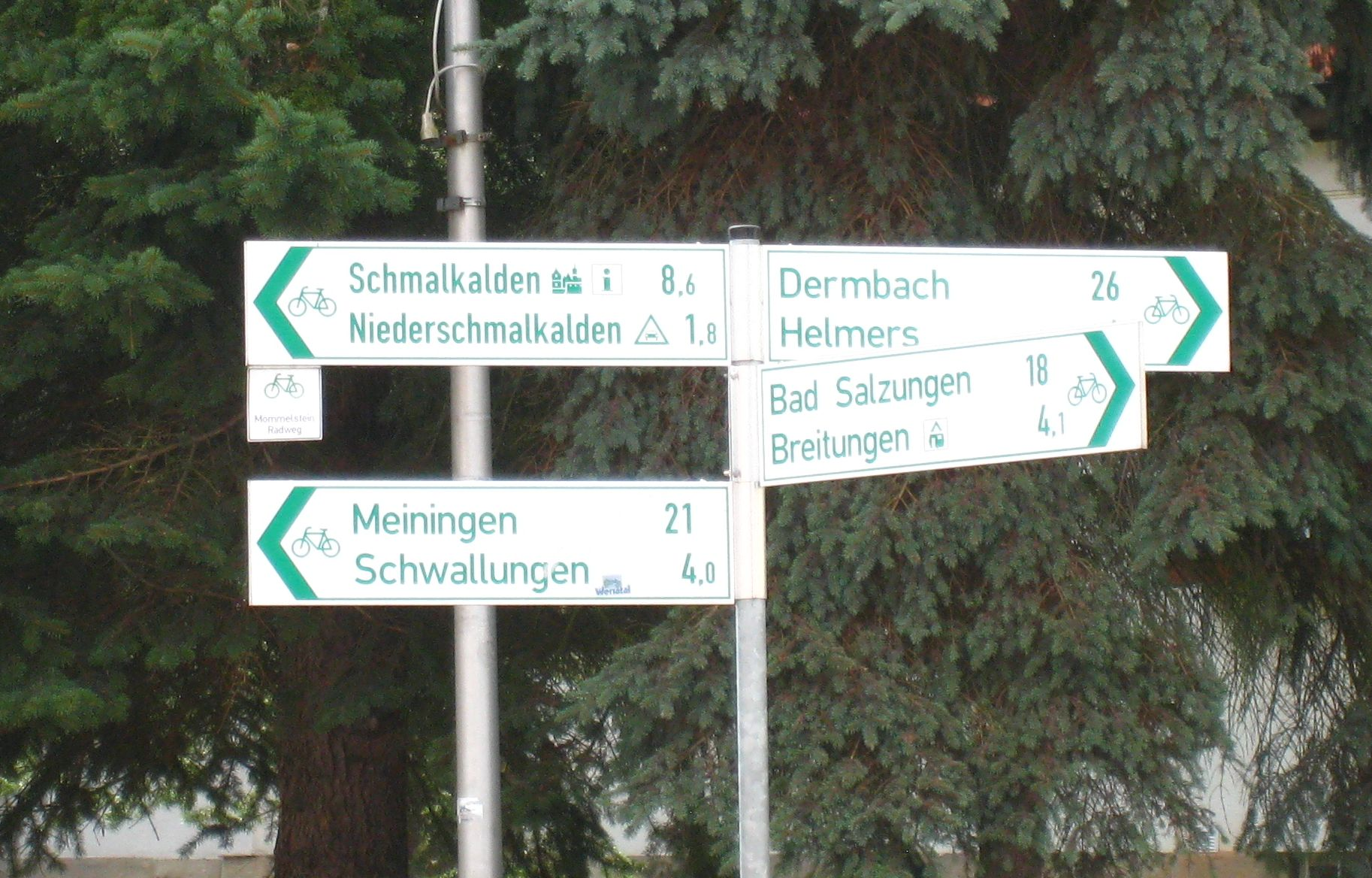 Znaki informacyjne trasy rowerowej doliny Werry w Wernshausen, Turyngia, Niemcy